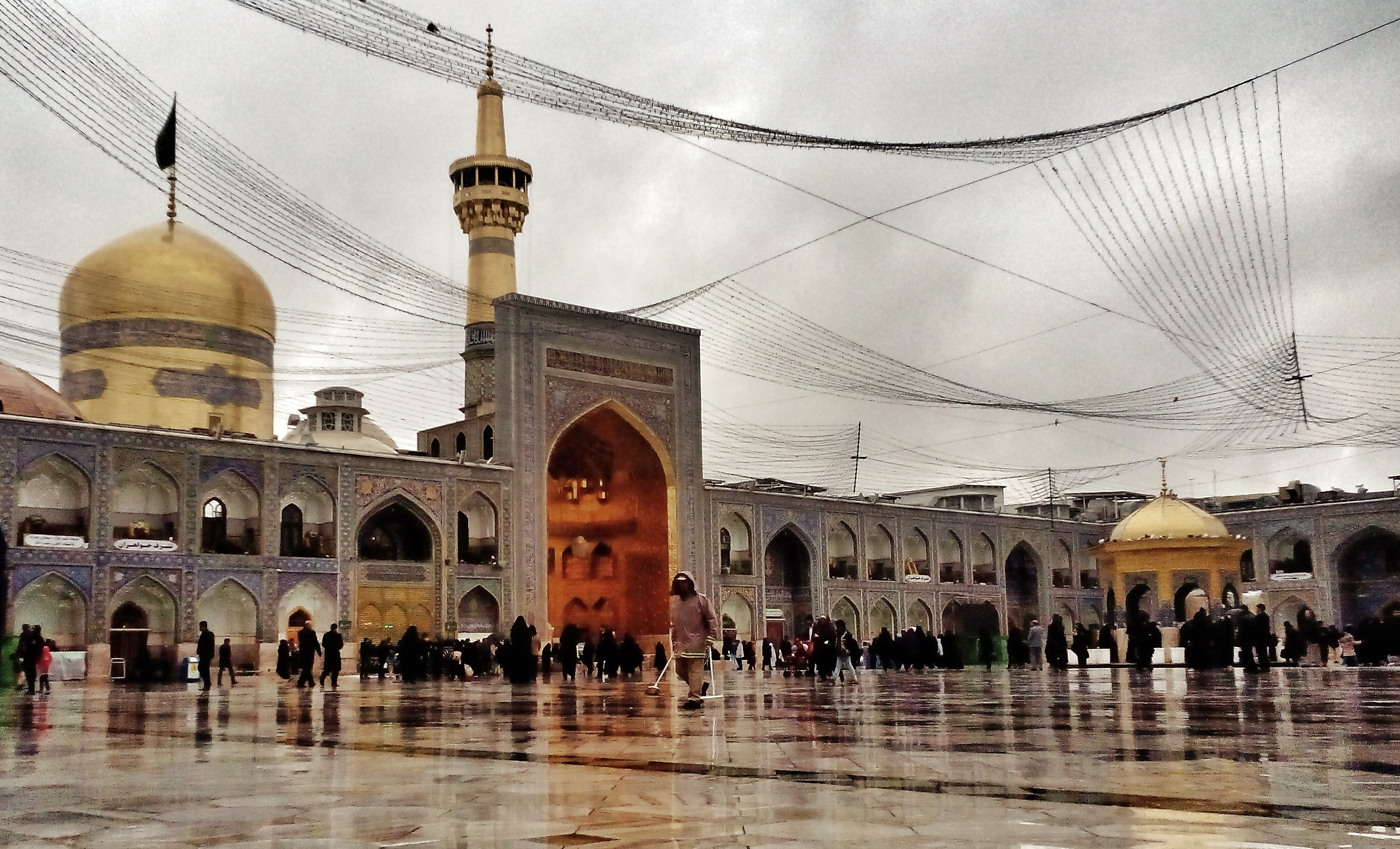 حرم امام رضا (ع)